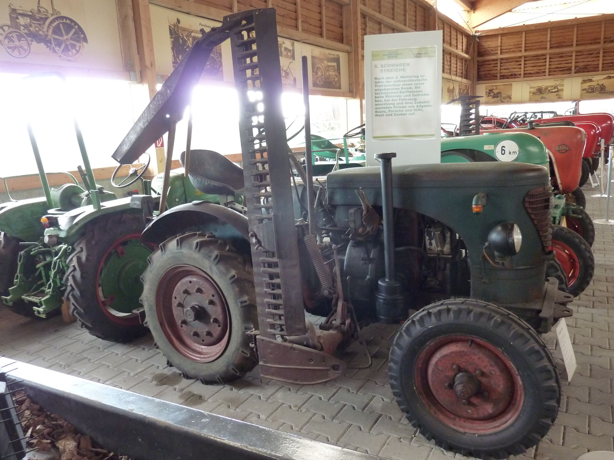 Deutsches Landwirtschaftsmuseum, Traktorenhalle. Im Vordergrund ein Zanker M 1.